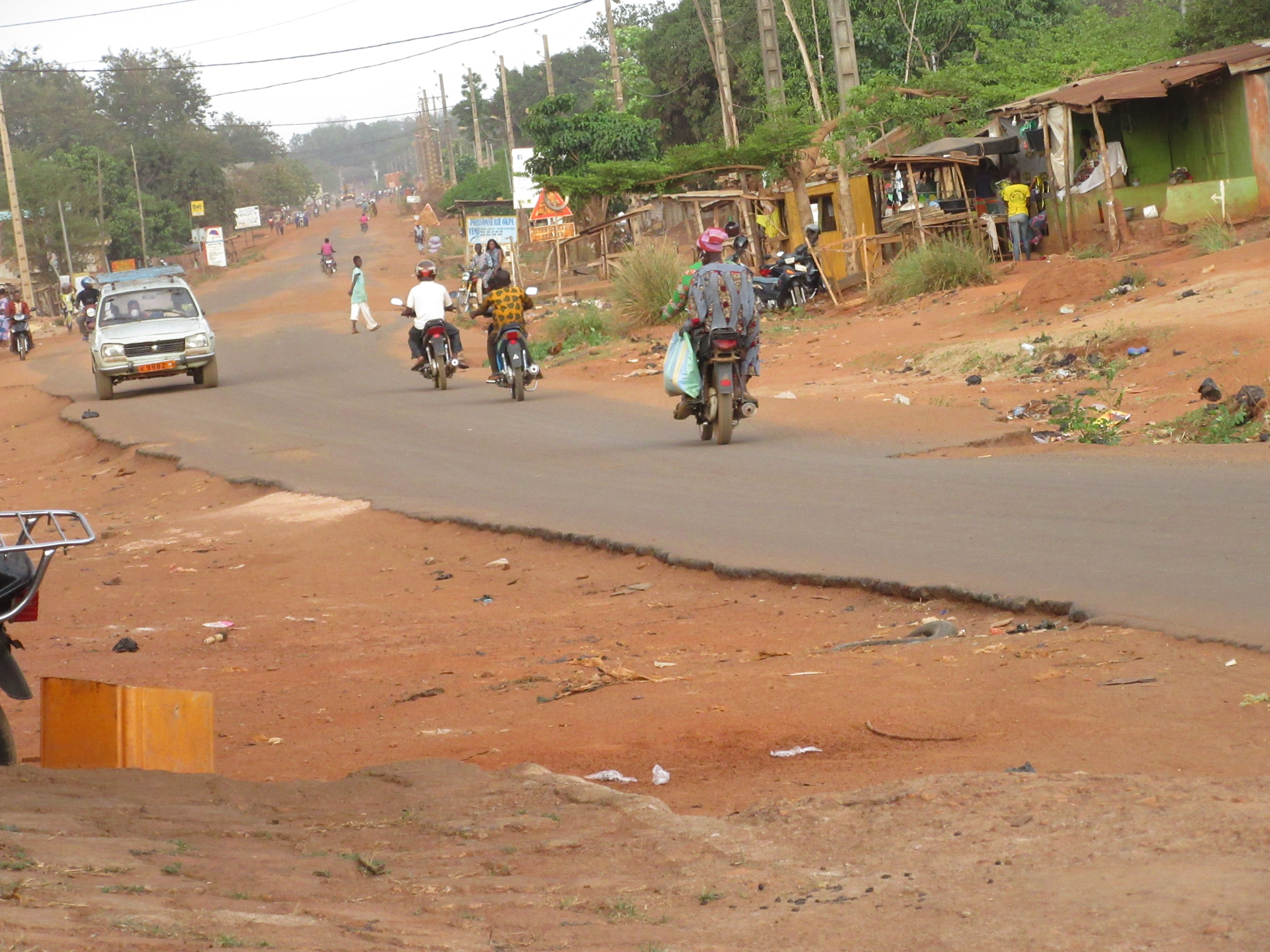 le transport à Pobé, Bénin This is an image with the theme "Africa on the Move or Transport" from: Benin